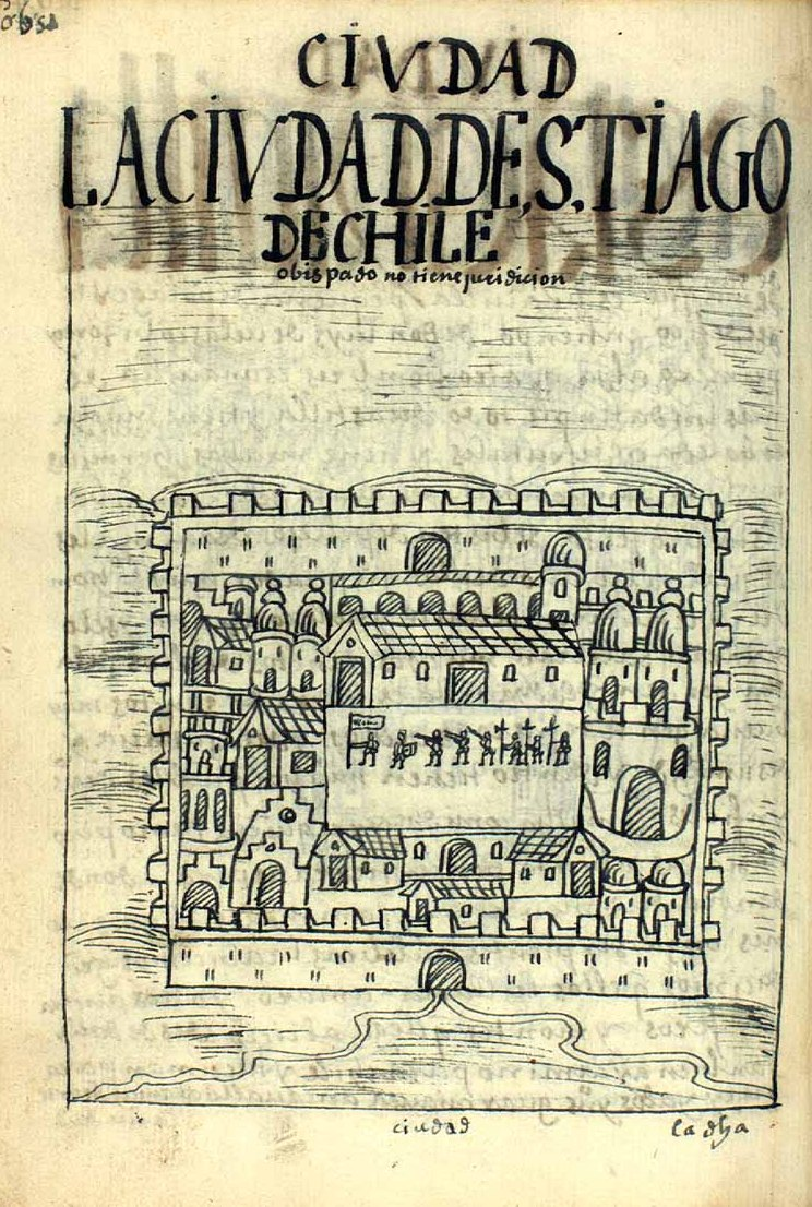 La ciudad de Santiago de Chile, obispado 1065 [1075] LA CIVDAD DE S[AN]TIAGO DE CHILE, obispado. No tiene juridición.